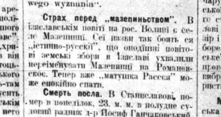 Страх перед "мазепиньством" // «Свобода» 1913, ч. 5.: Замітка в газеті про зросійщення назви села Мазепинці Ізяславського повіту й перейменування на шану російської імператорської родини Романових.